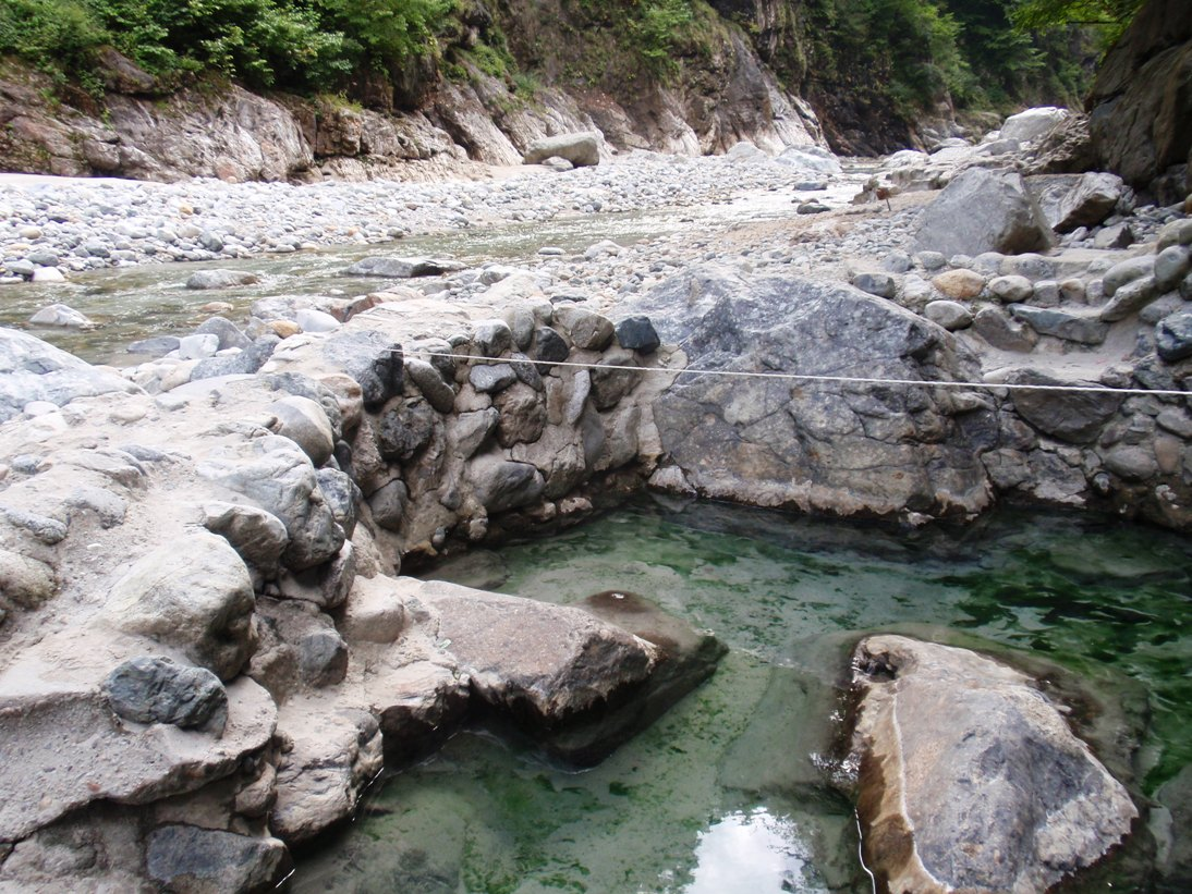 富山県黒部峡谷温泉郷、鐘釣温泉の河原の野湯。